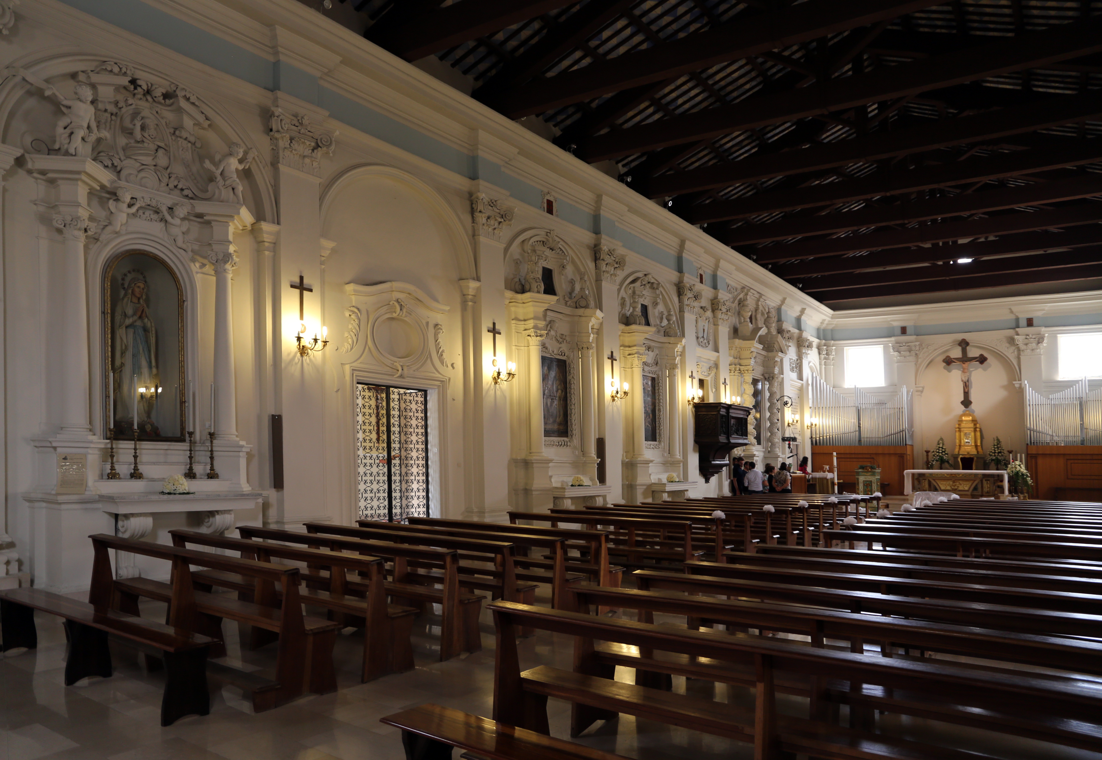 Piazza Santa Maria Maggiore This is a photo of a monument which is part of cultural heritage of Italy.